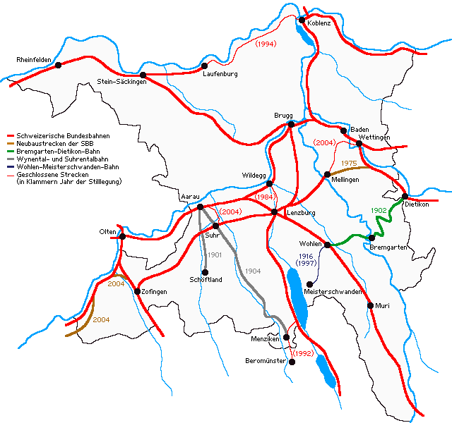 Entwicklung des Eisenbahnnetzes im Aargau bis 2004